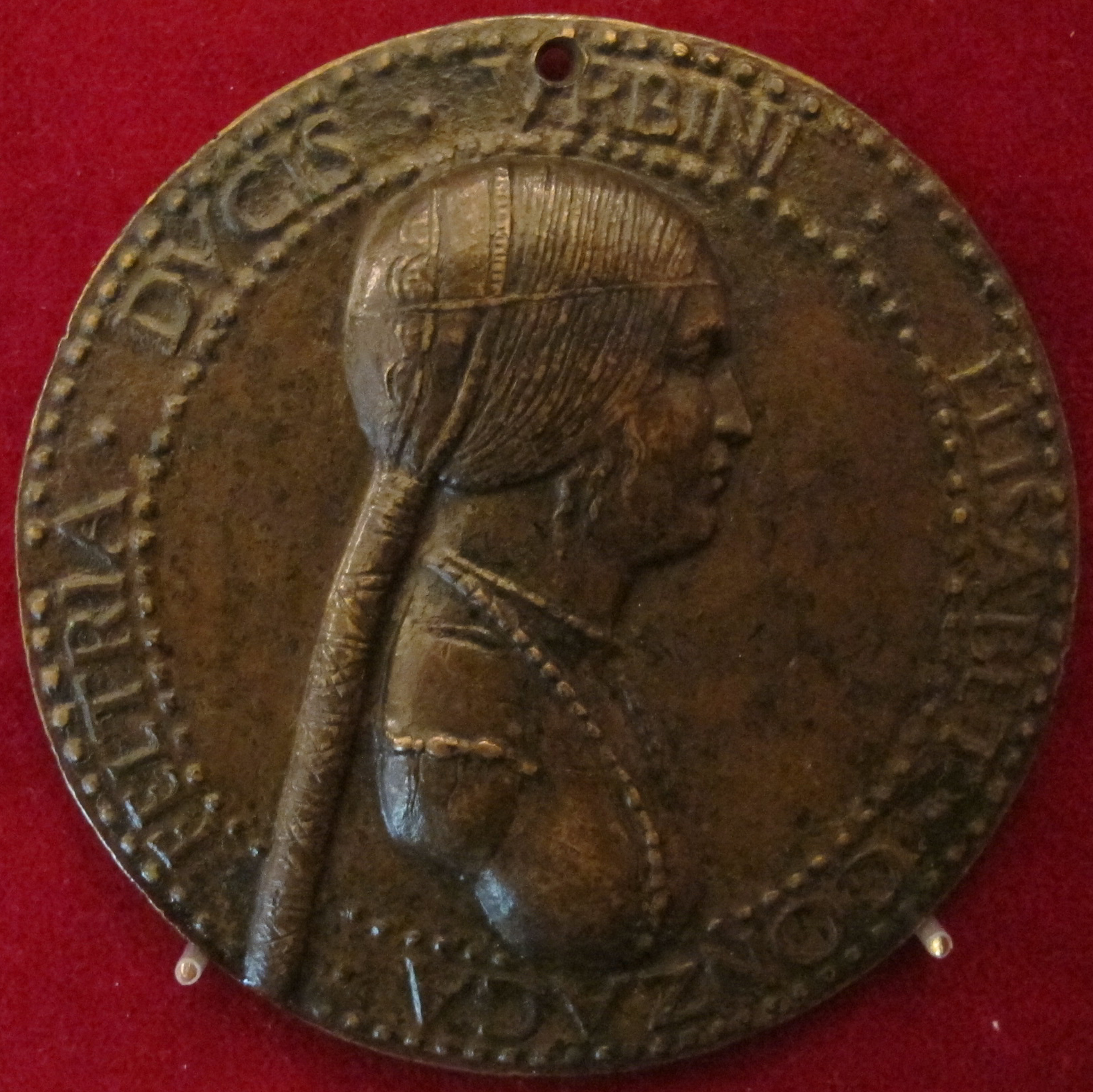 Adriano fiorentino, elisabetta gonzaga duchessa di urbino, 1495